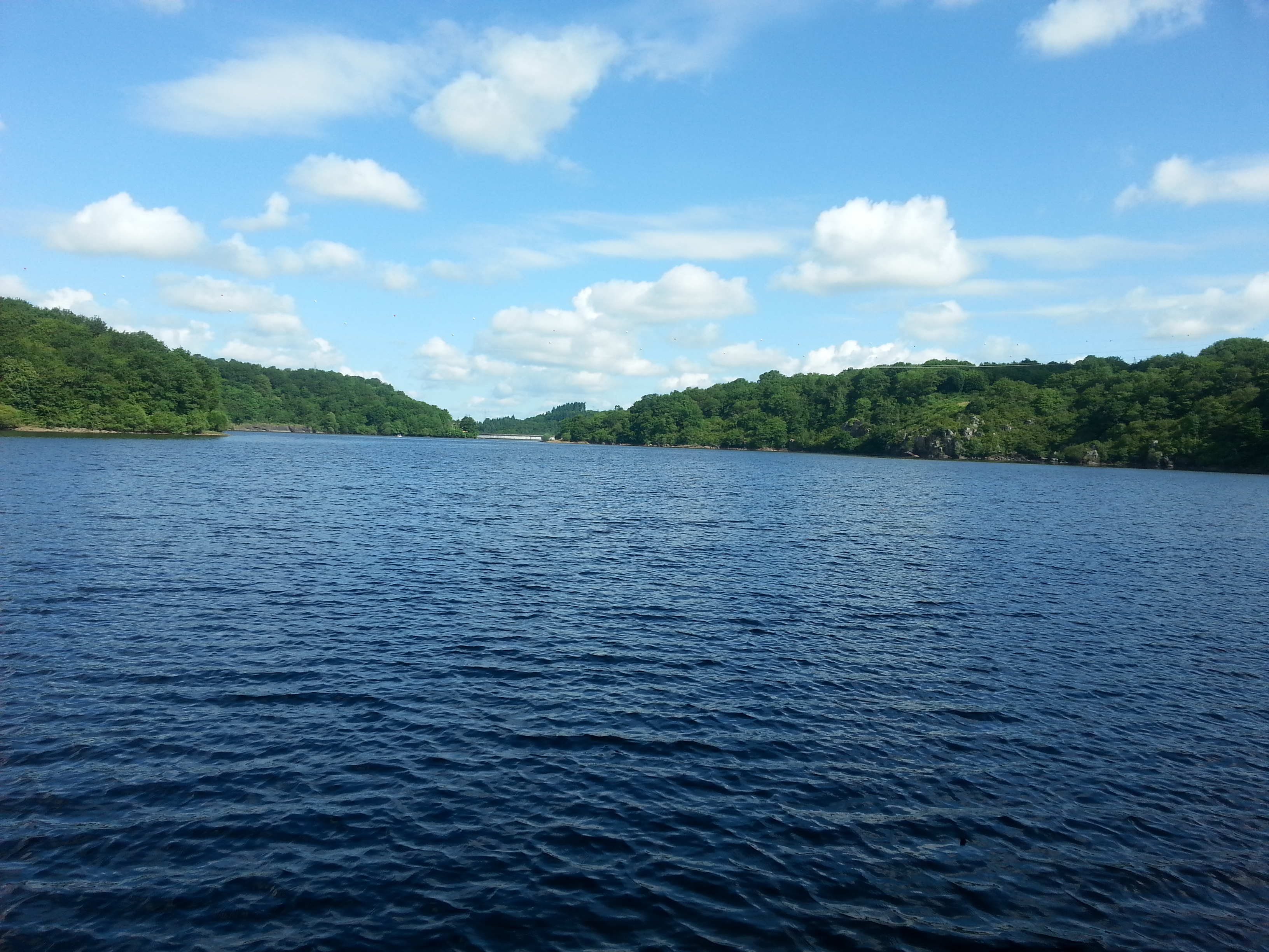 Lac de Chambon : Le lac depuis la rive droite.